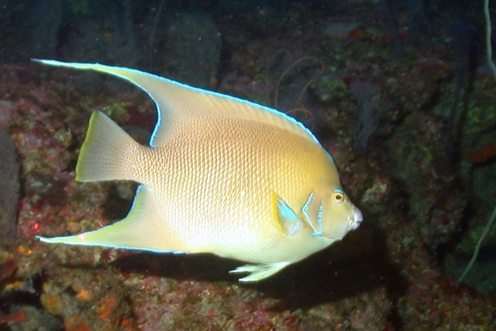 Bermuda-Engelfisch (Holacanthus bermudensis) Goode 1876